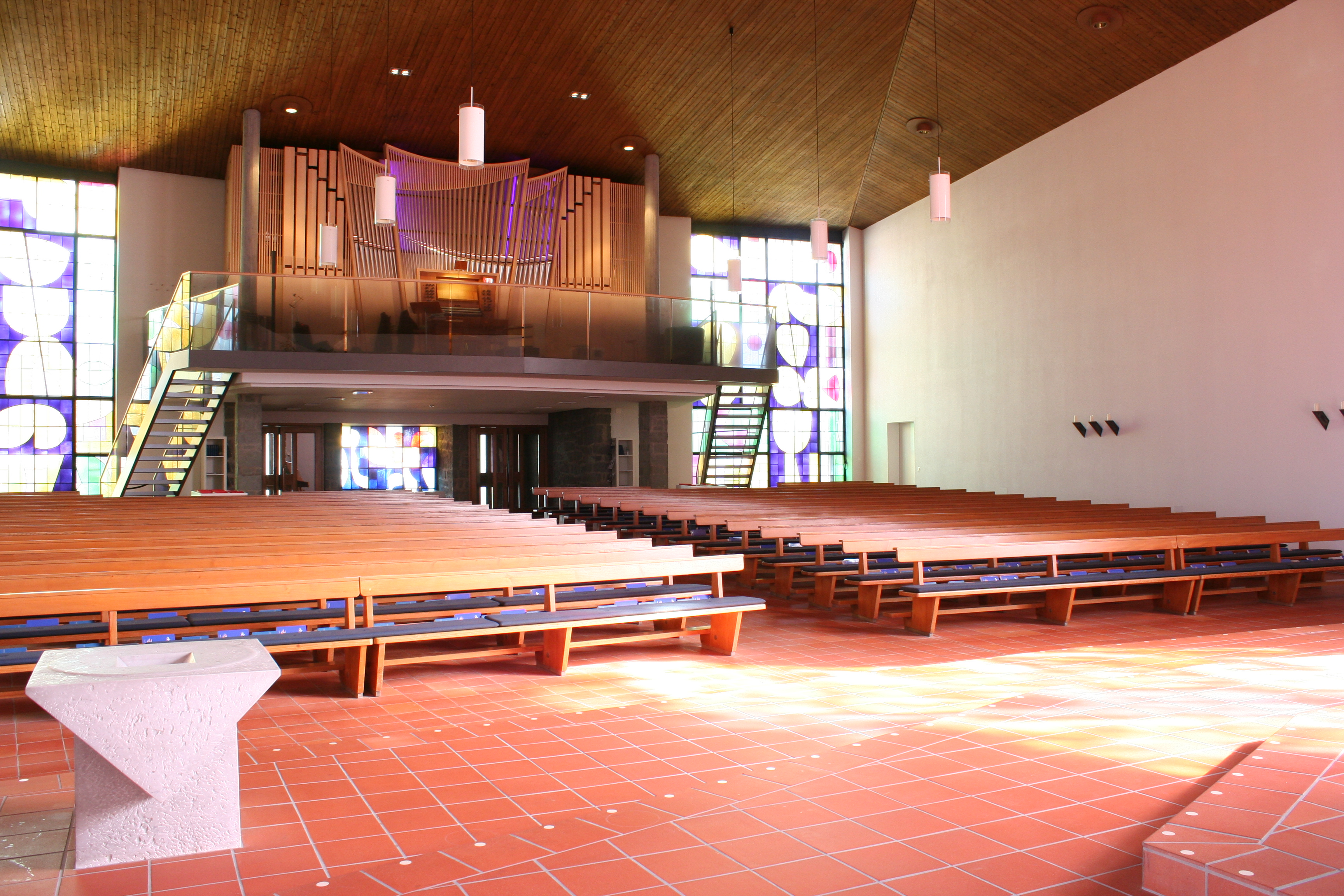 Römisch-katholische Pfarrkirche St. Antonius Wallisellen, Innenansicht